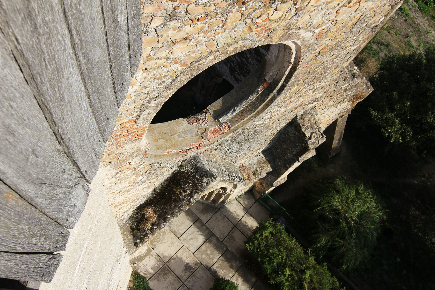 Fațada vestică a bisericii fostei mănăstiri Cârța 02